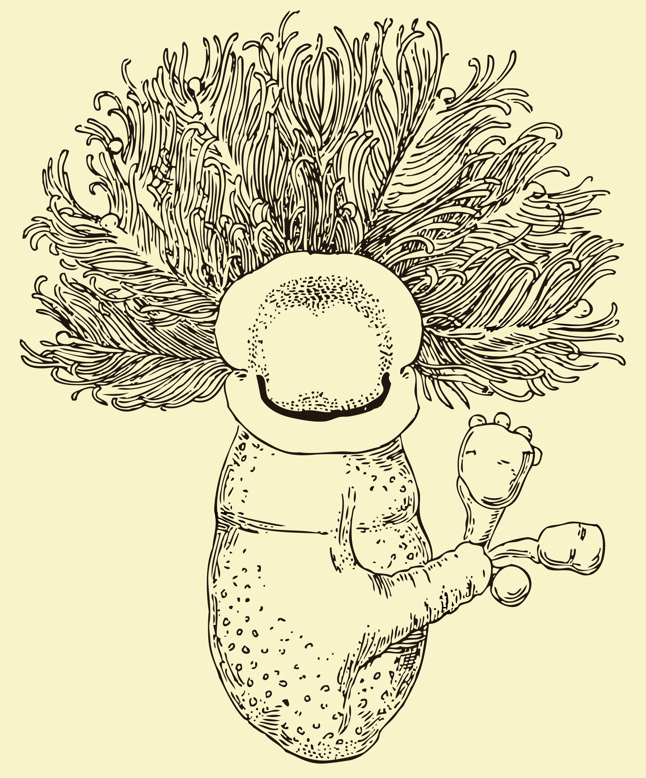 Cephalodiscus dodecalophus, Cephalodiscida, Pterobranchia, Hemichordata. Derivado de ilustración: Sedgwick, A, Lister, JJ, Shipley, AE (1898) A student's text-book of zoology. S. Sonnenschein, Londres. Vol. 3, p.105, fig. 77. Autores fallecidos hace más de 70 años: Sedgwick, Adam (1854-1913) Lister, Joseph Jackson (1857-1927) Shipley, Arthur Everett (1861-1927) Ilustración basada en M'Intosh, William (1838-1931) Imagen obtenida a través de Internet Archive, escaneado original de la Wellcome Library, recortada, limpiada de rotulación y vectorizada.